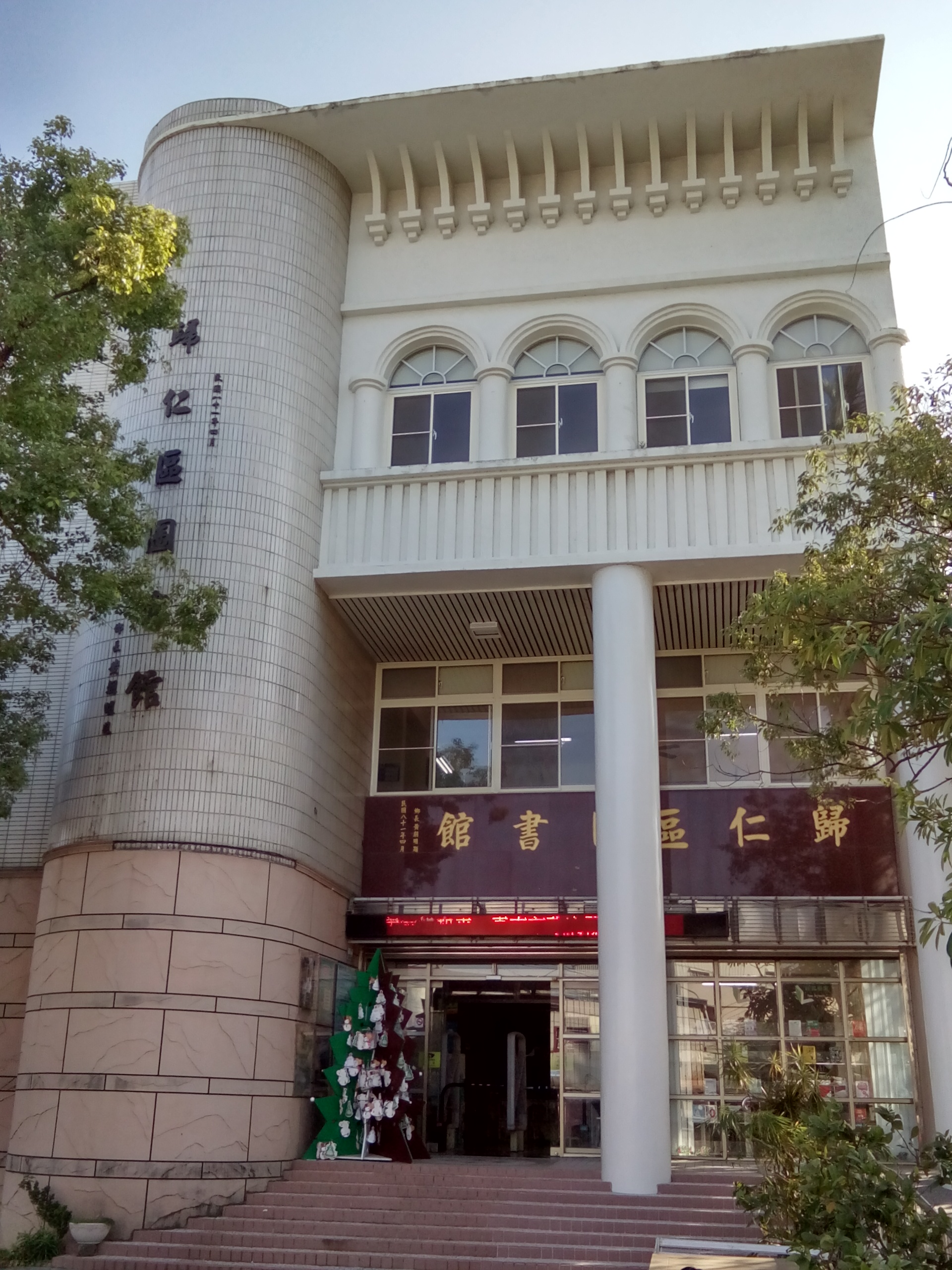 臺南市歸仁區圖書館